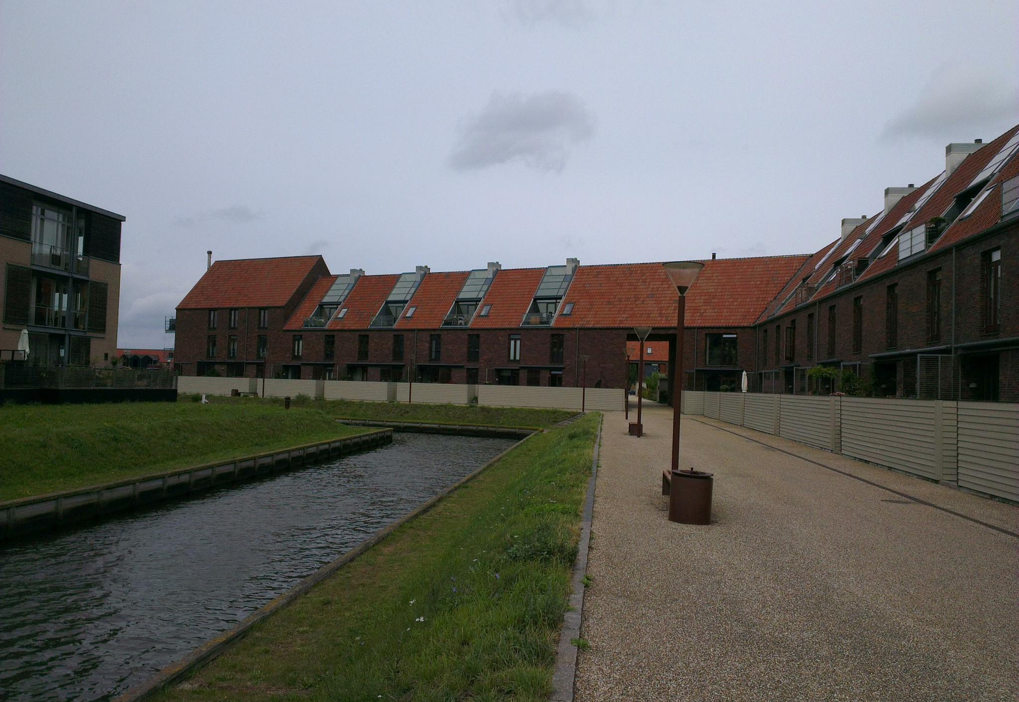 Amsterdamhusene, Frederikssund